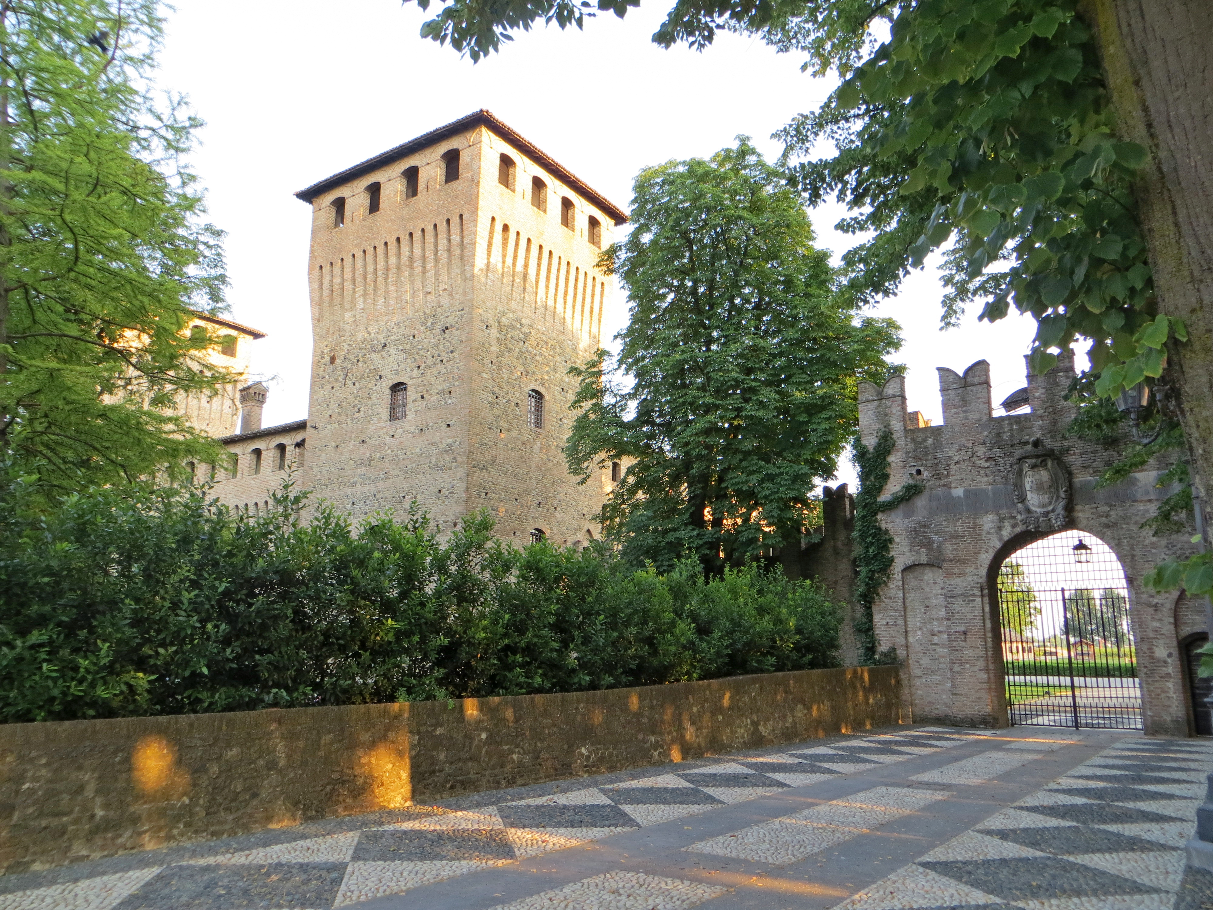 Castello di Castelguelfo - torre nord-ovest